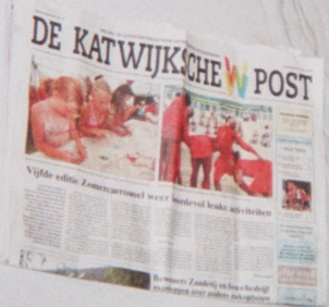 Fotootje van een oude KP. Foto door mij genomen, maar de inhoud van de krant is natuurlijk auteursrechtelijk beschermd (maar dankzij mijn geniale fotokunsten onleesbaar).